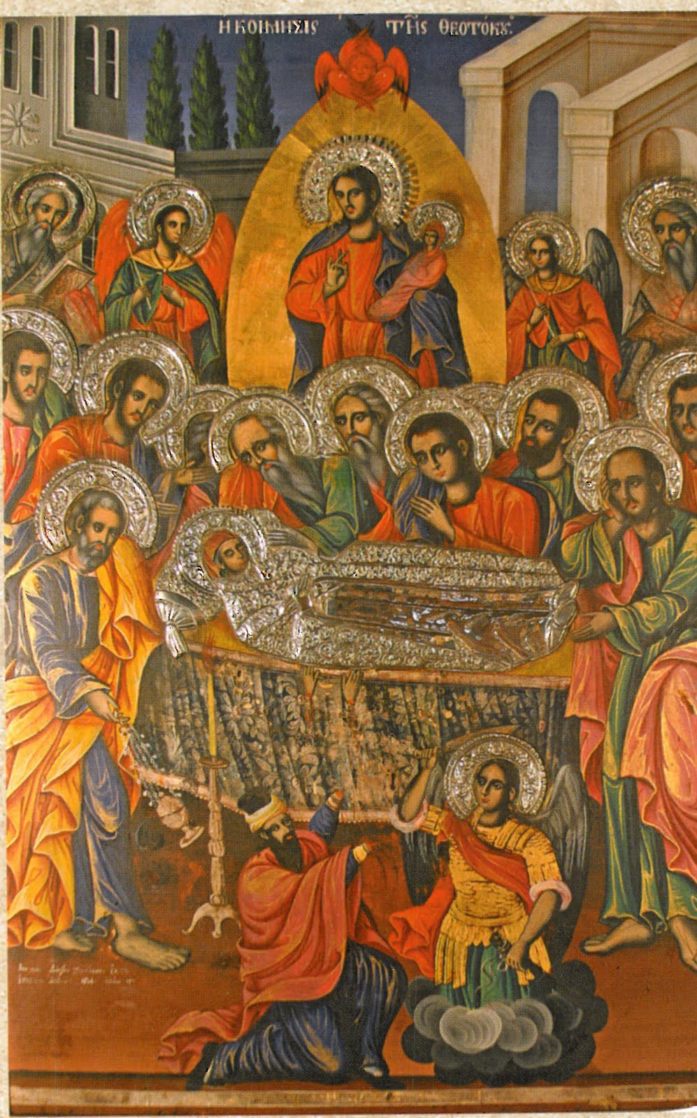 Икона на Успение Богородично от Дичо Зограф, църквата "Успение Богородично" в Епаноми.